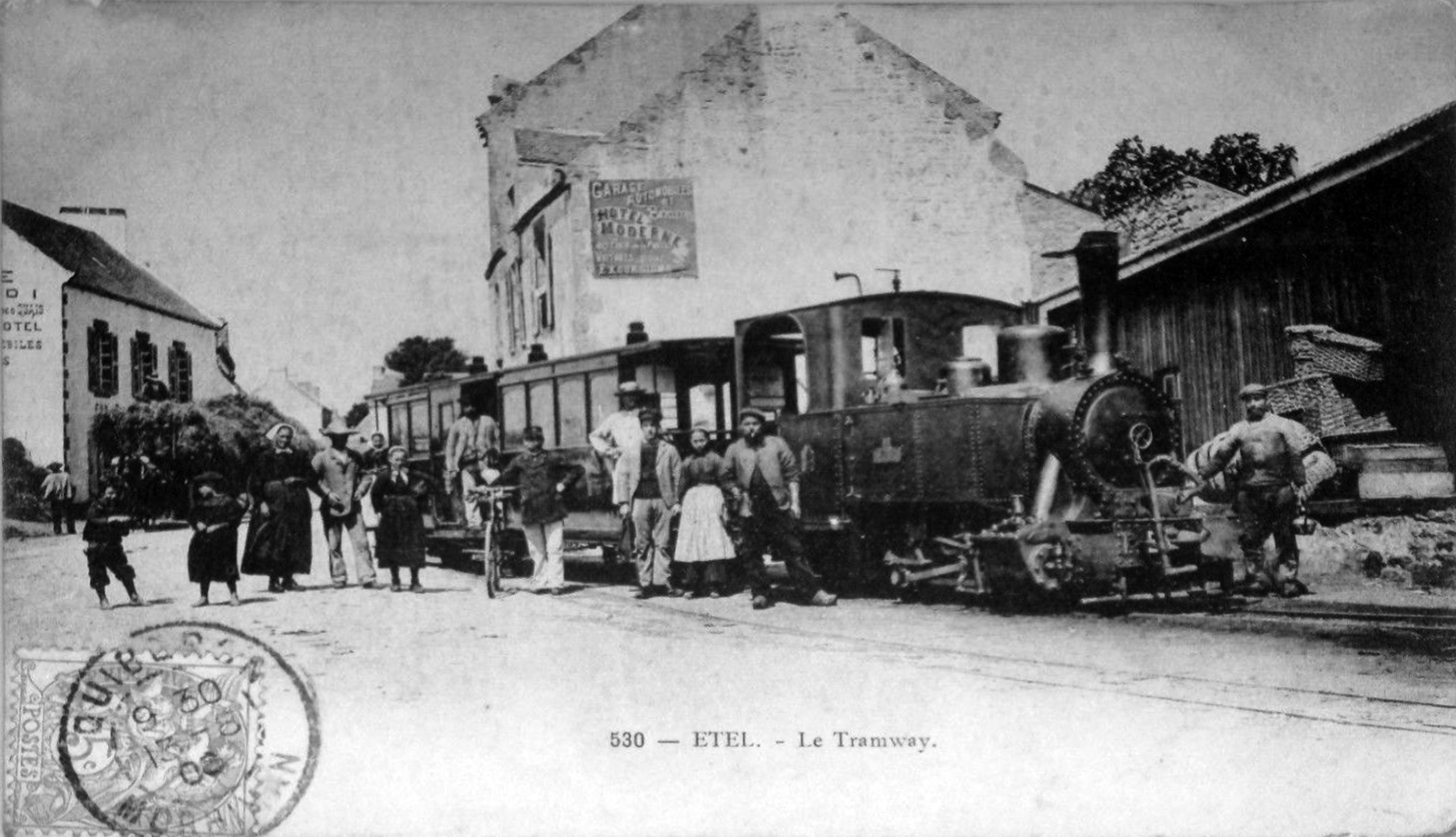 600mm gauge Tramway de la Trinité à Étel, circa 1908